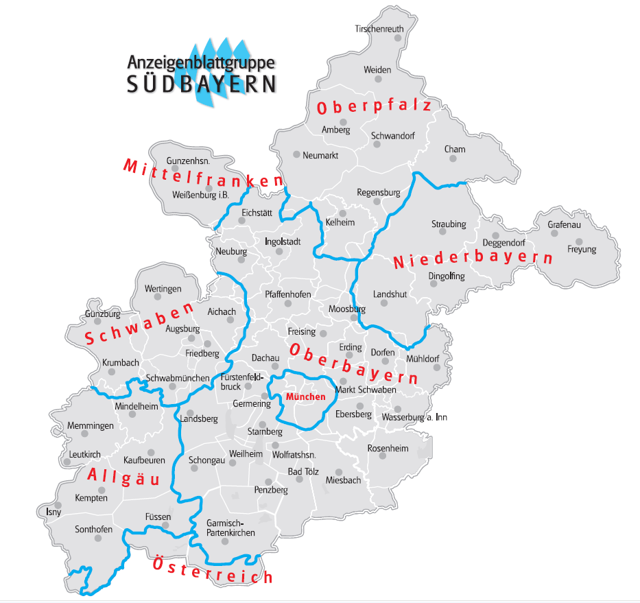 Verbreitungsgebiet deAnzeigenblattgruppe Südbayern)